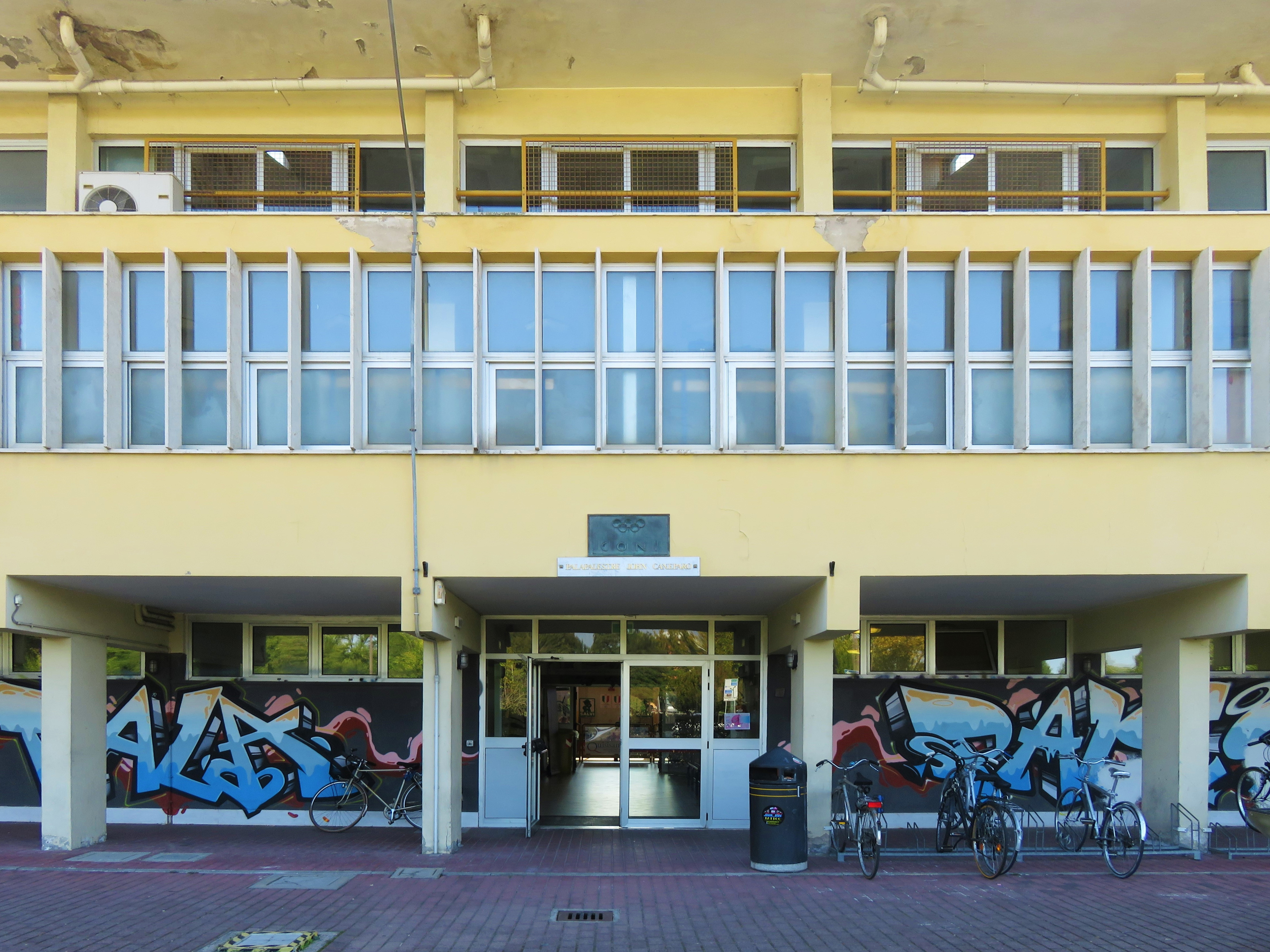 Palapalestre "John Caneparo", ingresso